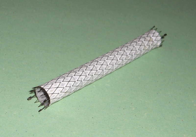 Un stent couvert de 8mm (utilisation pour lésions iliaques)